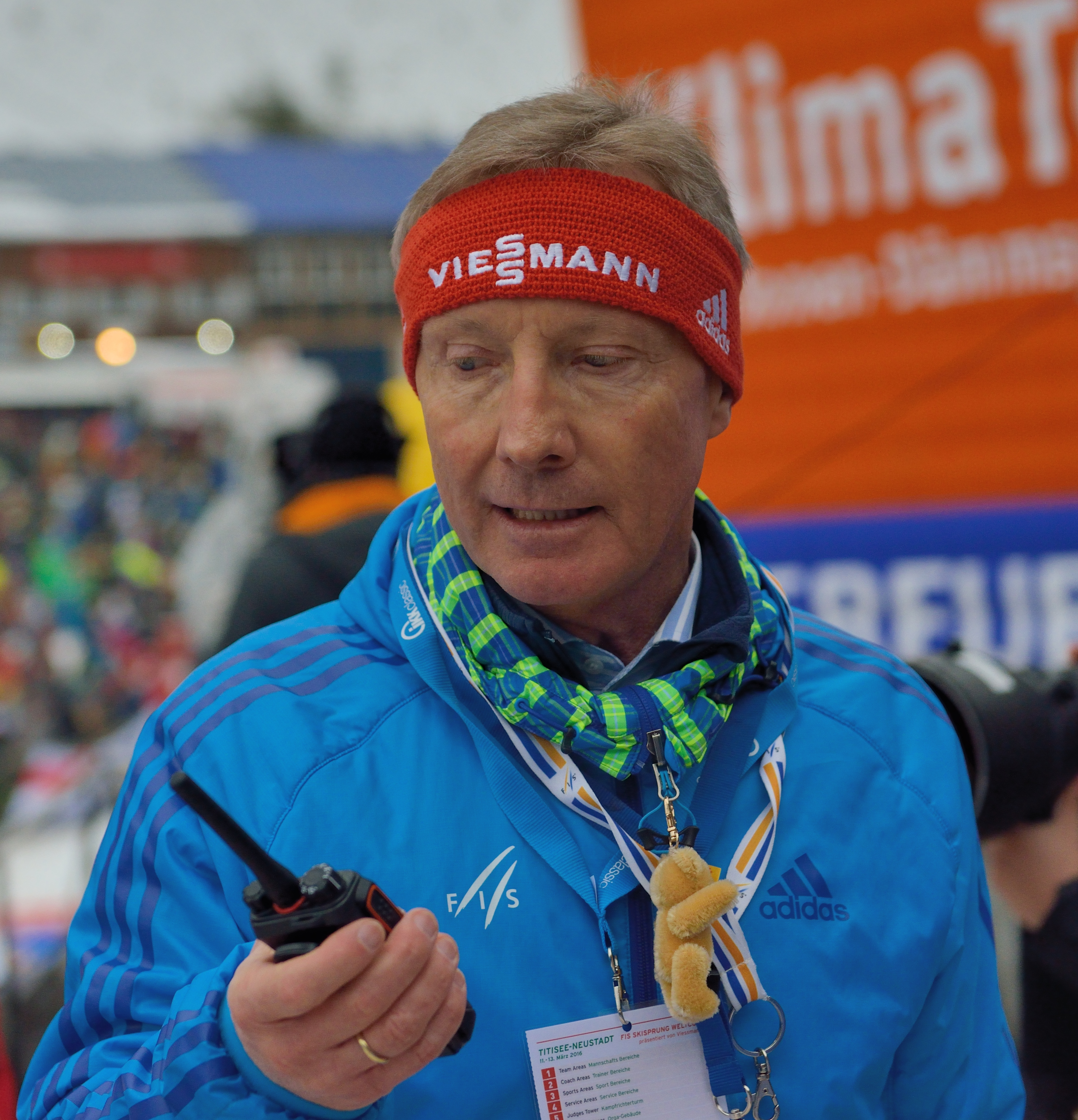 FIS Ski Weltcup Titisee-Neustadt 2016: Walter Hofer, FIS Skisprung-Renndirektor